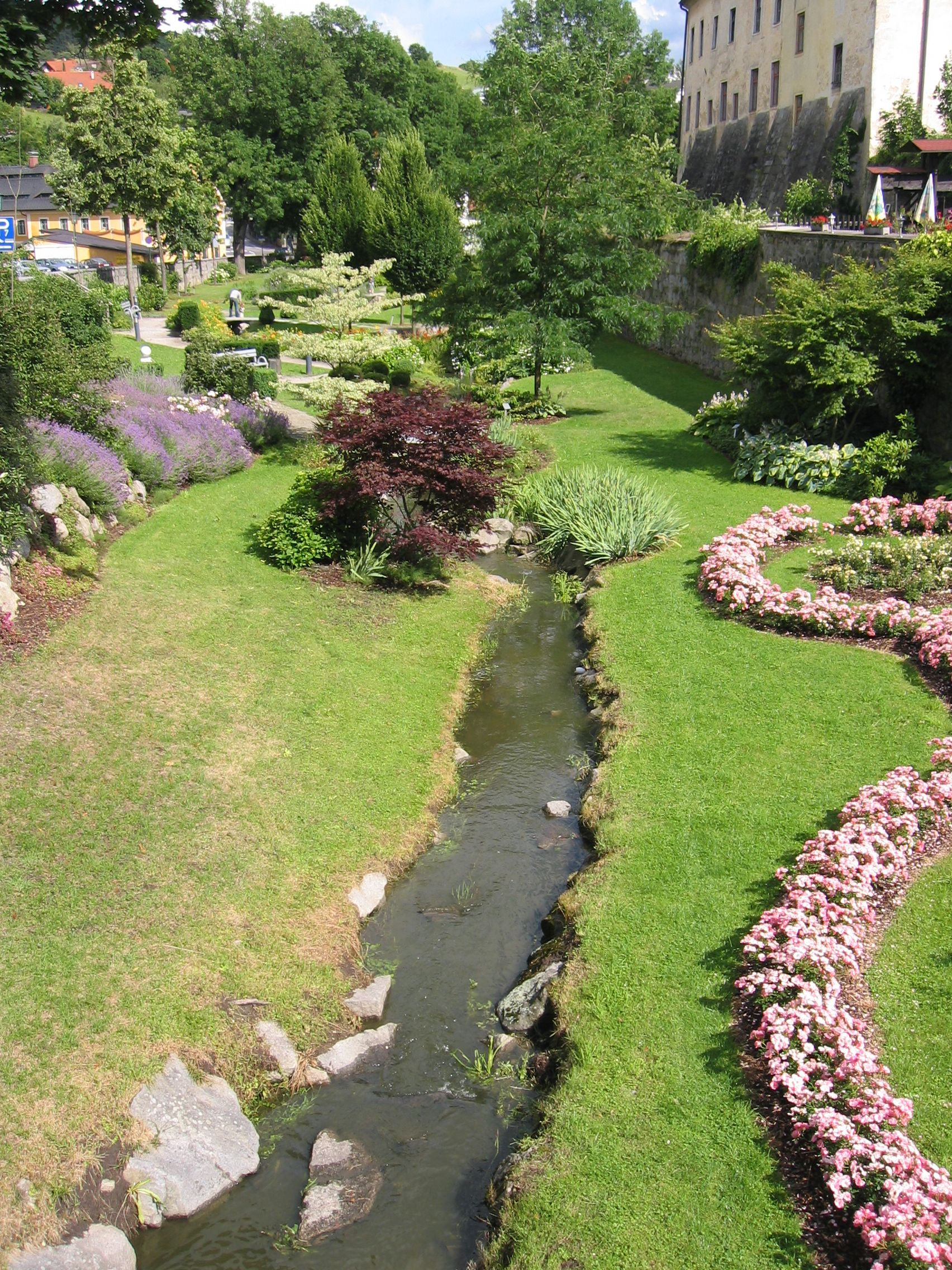 Stadtgraben